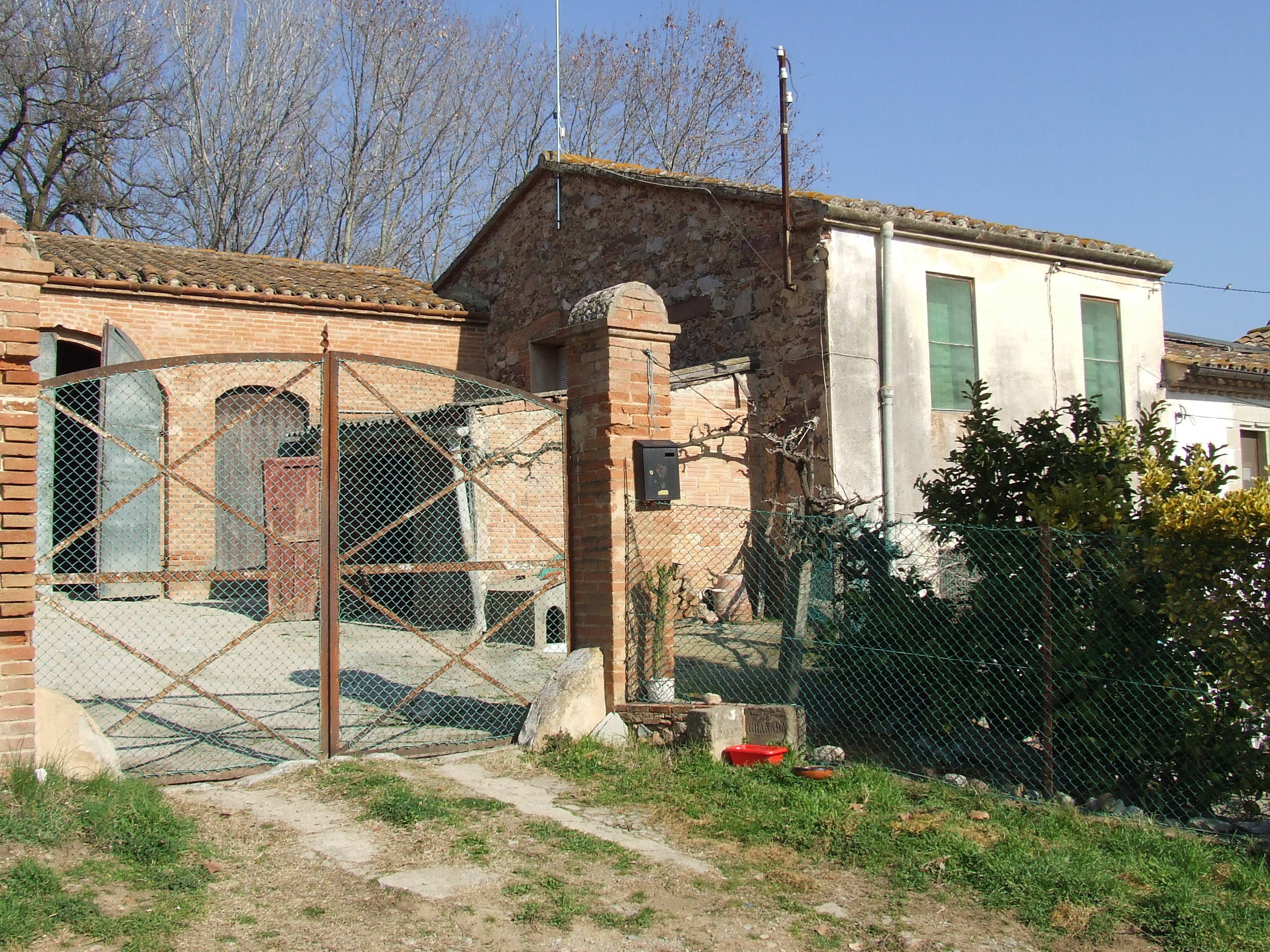 Can Molina (Bigues, Bigues i Riells, Vallès Oriental)